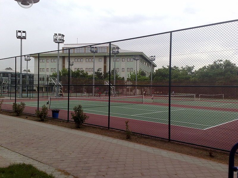 diğer_sürümler= Gazi University Central library